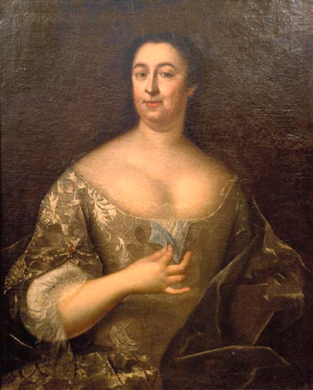 Графиня Марфа Ивановна Остерман (1698-1781), в девичестве Стрешнева, супруга графа Андрея Ивановича Остермана Портрет графини М.И. Остерман 1738 г. Х., м. 89,0х72,0 ГИМ 62356 ИЗО ИI-1324 Лит. Селинова Т.А. Портретная галерея Глебовых-Стрешневых в с. Покров- ское // Памятники культуры. Новые открытия. 1996. - М. 1997. - С. 316 (ил.). Немец у российского трона. Граф Андрей Иванович Остерман и его время. Каталог выставки в ГИМе.- М., 2000 - Кат. 113 (ил. на с. 69)